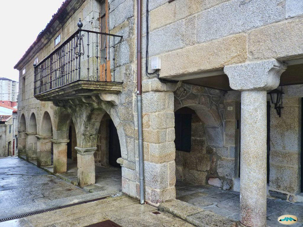 Ribadavia-Barrio judío3